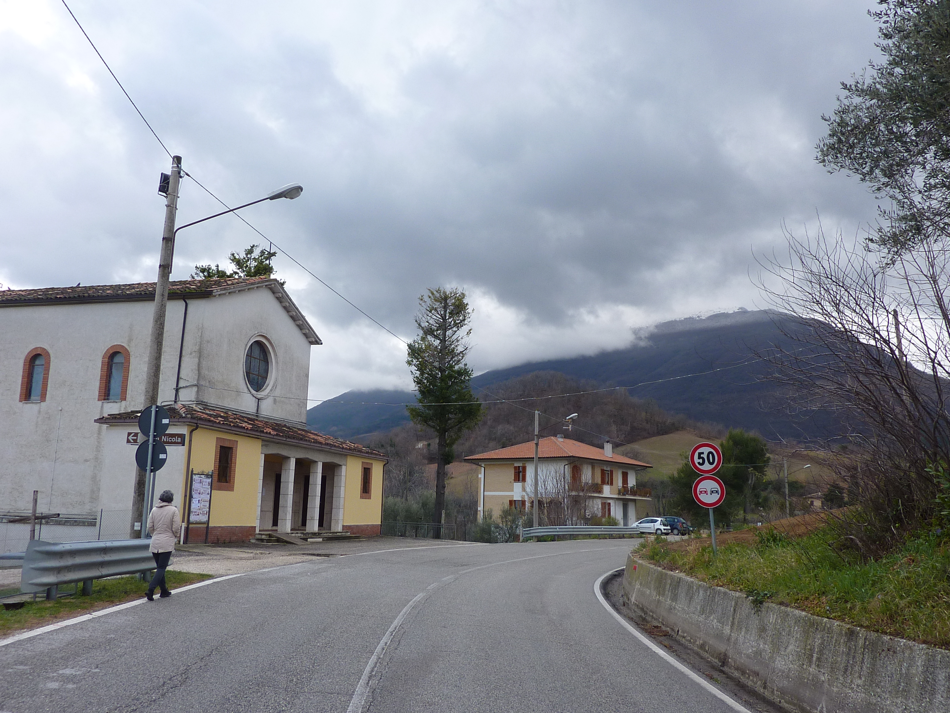 La chiesa di San Nicola, sulla SS81